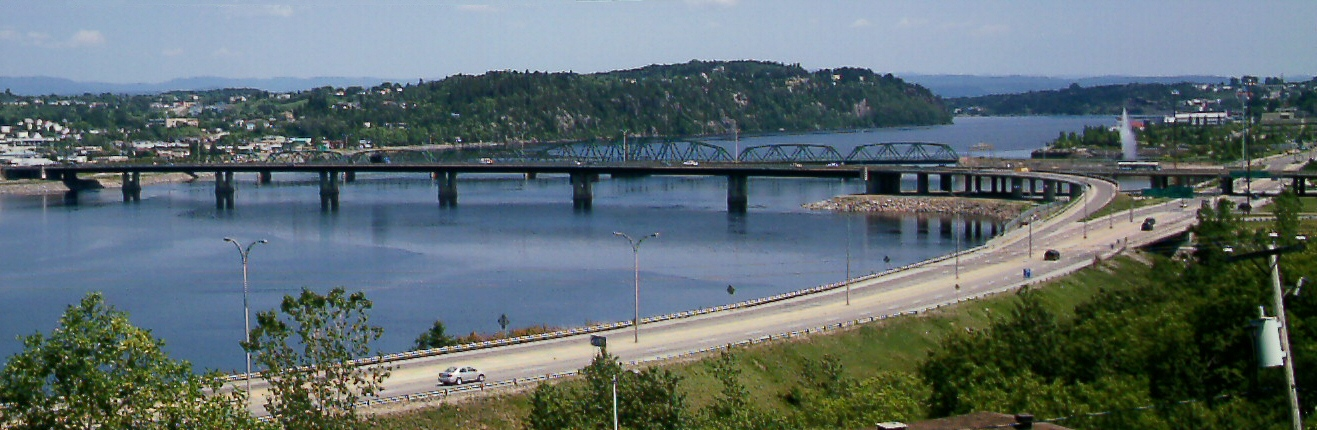 La rivière Saguenay passant dans Chicoutimi